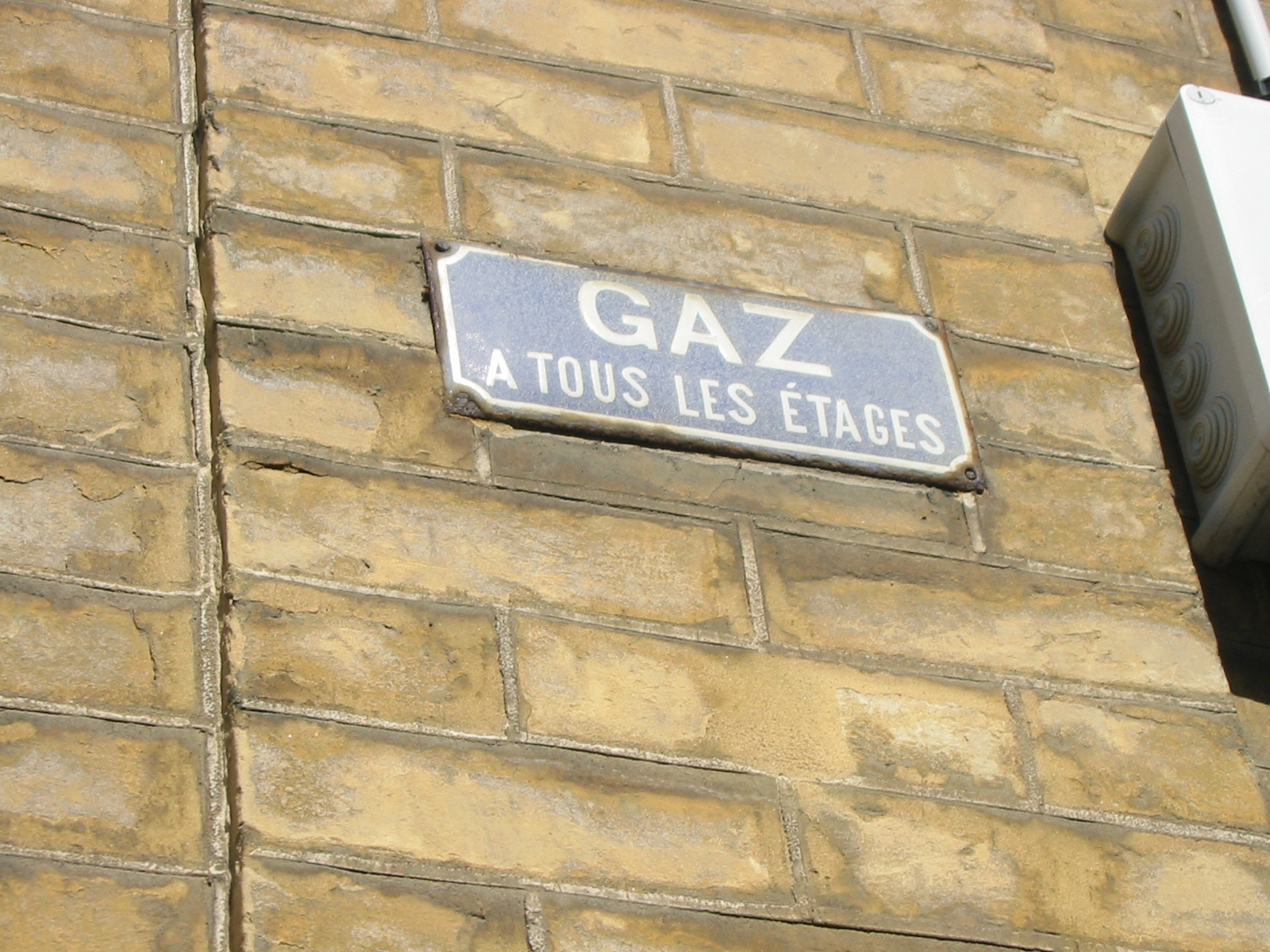 Ces plaques anciennes témoignent de l'importance pour un logement de disposer de l'usage du gaz de ville lorsque certaines habitations en étaient dépourvues. Photographie prise au Havre.